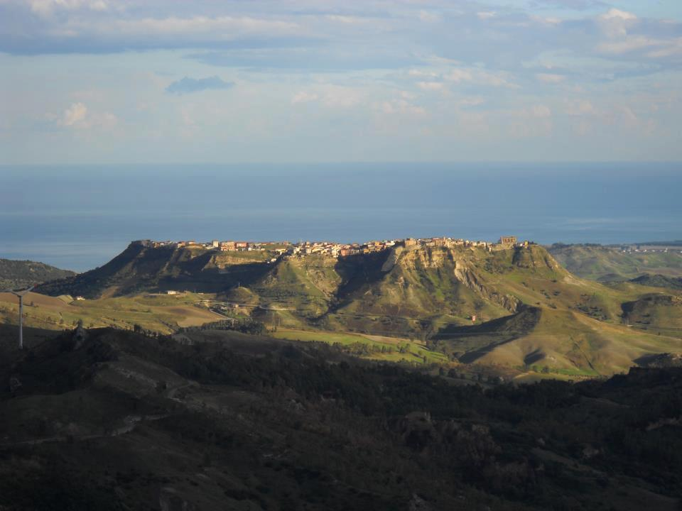 Strongoli